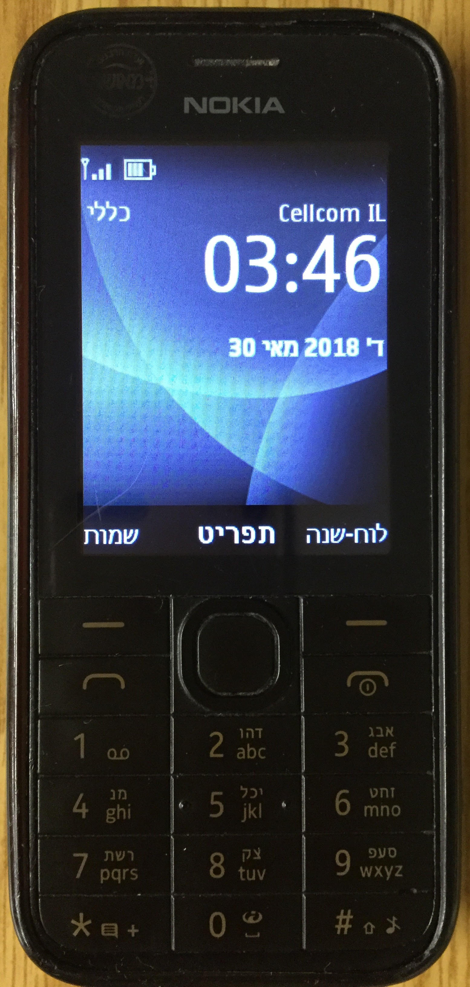 פלאפון כשר, נוקיה 208, מאי 2018